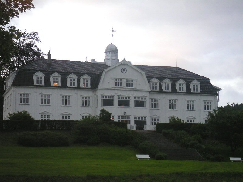 Sauda Fjordhotell i Sauda.